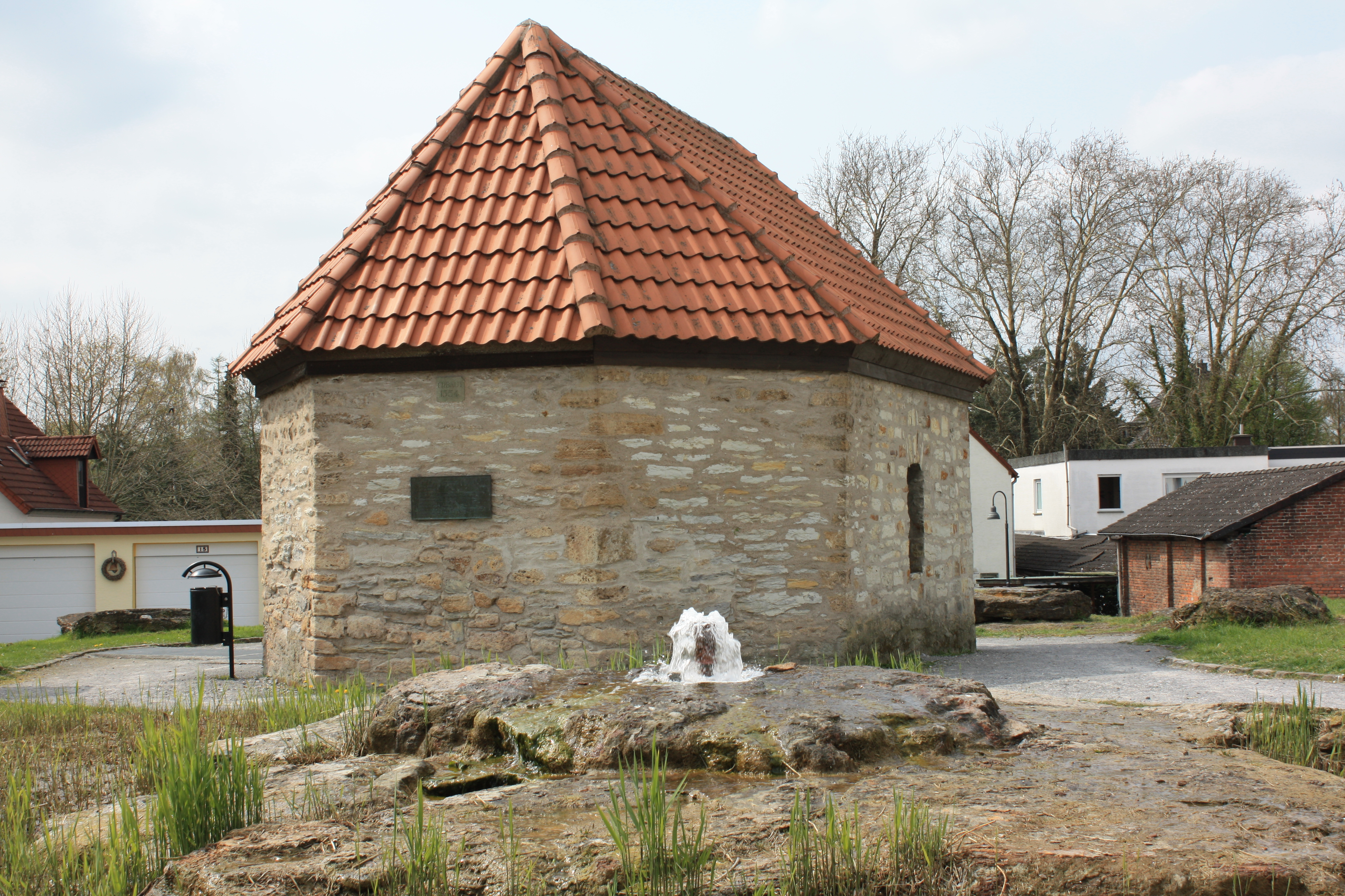 Quelltuffhügel (Küttfelsen) in Salzkotten; im Hintergrund das ehemalige Brunnenhaus